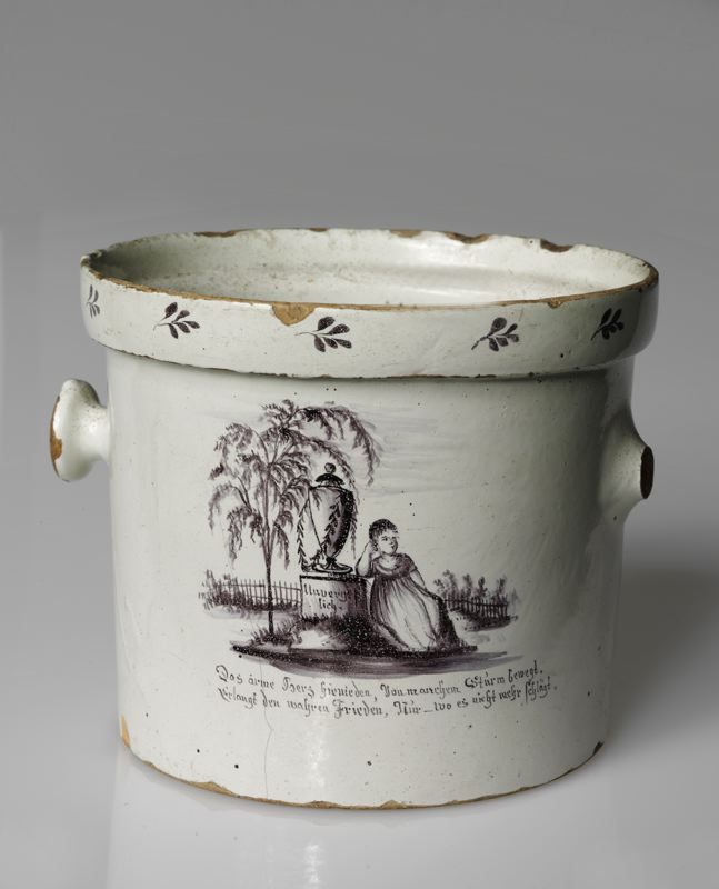 Cache-Pot des Hafners Rudolf Kuhn aus Pfäffikon, Kanton Zürich, 1812, bemalt von Johann Heinrich Egli